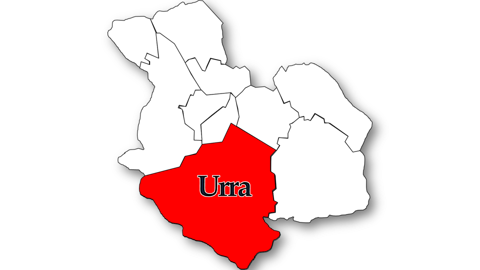 Evolução da População